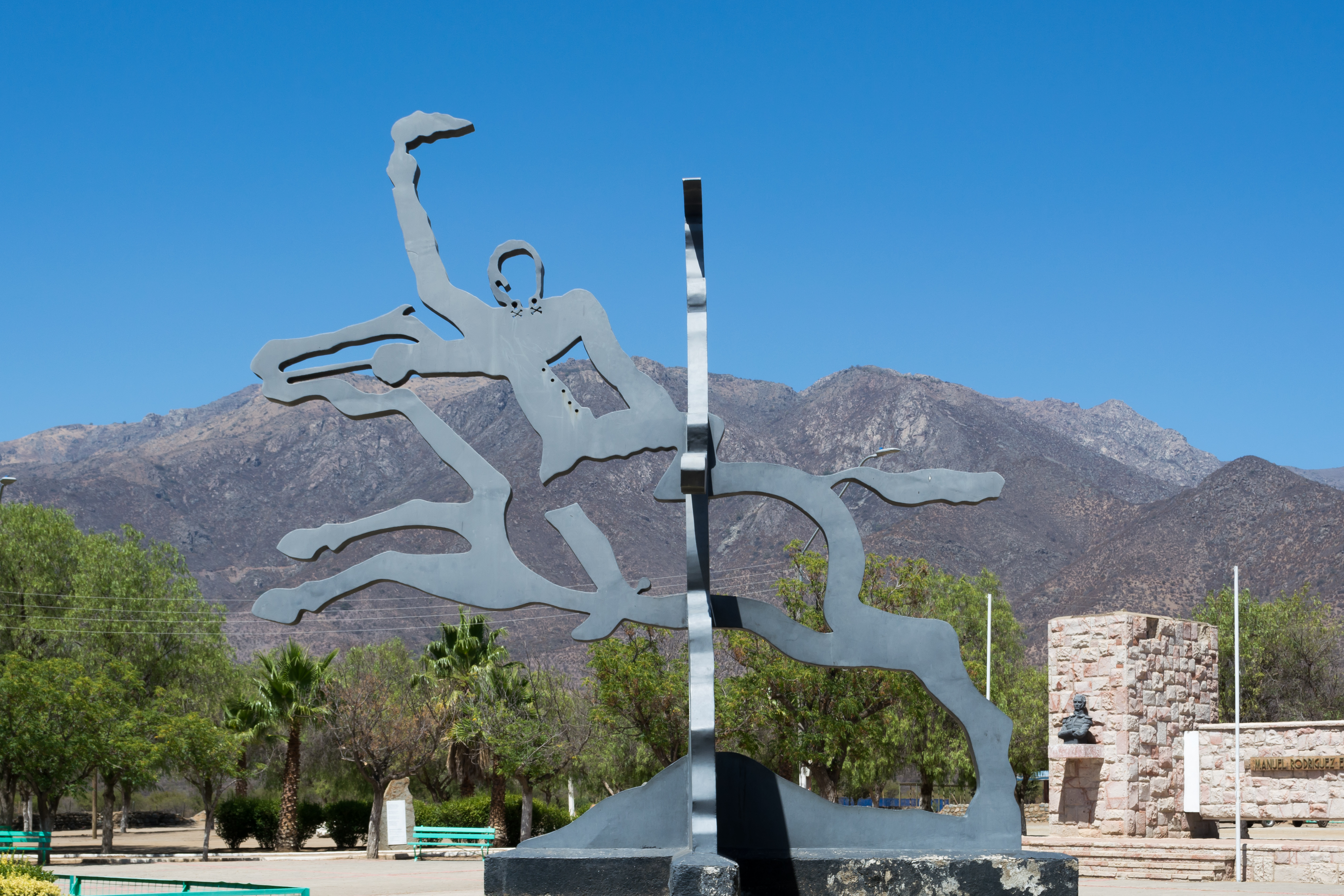 Monumento a Manuel Rodríguez, Tiltil, Región Metropolitana de Santiago, Chile